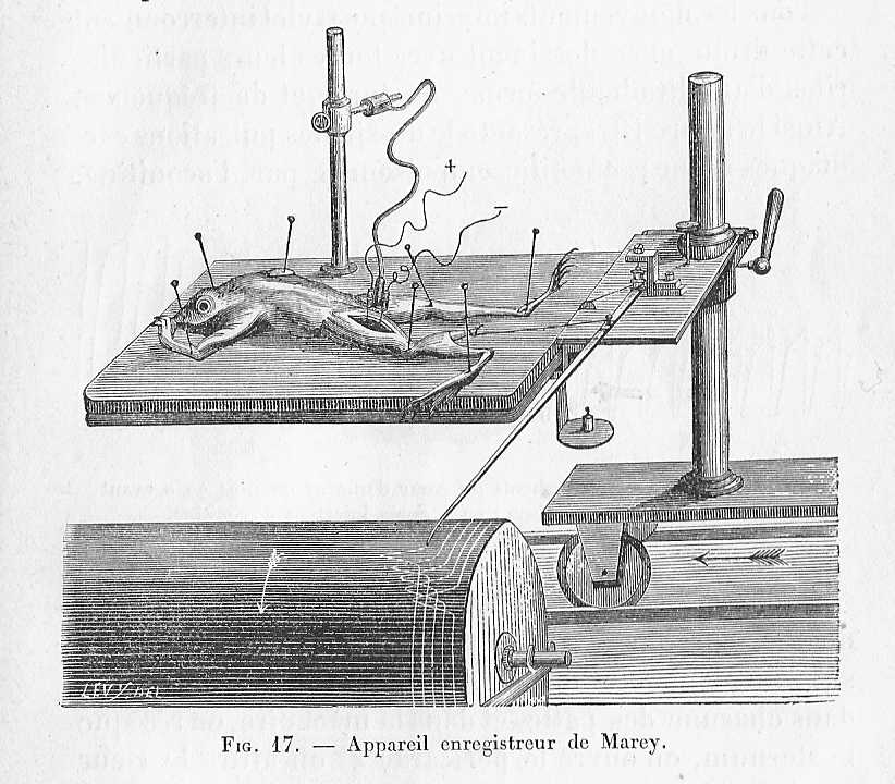 Appareil enregistreur de Marey en action sur une grenouille